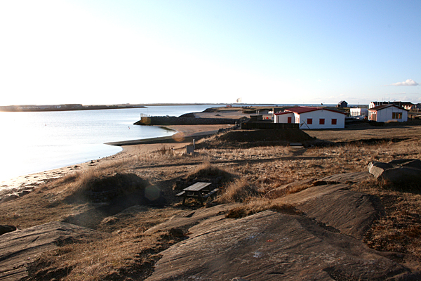 Fossvogurinn séður til vesturs út á Skérjafjörð, Nauthólsvíkin í forgrunni